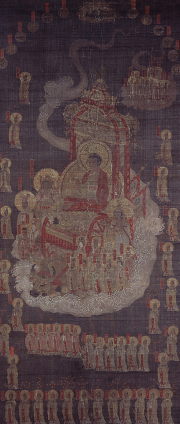 치성광여래도/熾盛光如來往臨圖, 비단에 채색, 미국 보스턴박물관 소장